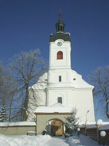 Hladovka temploma